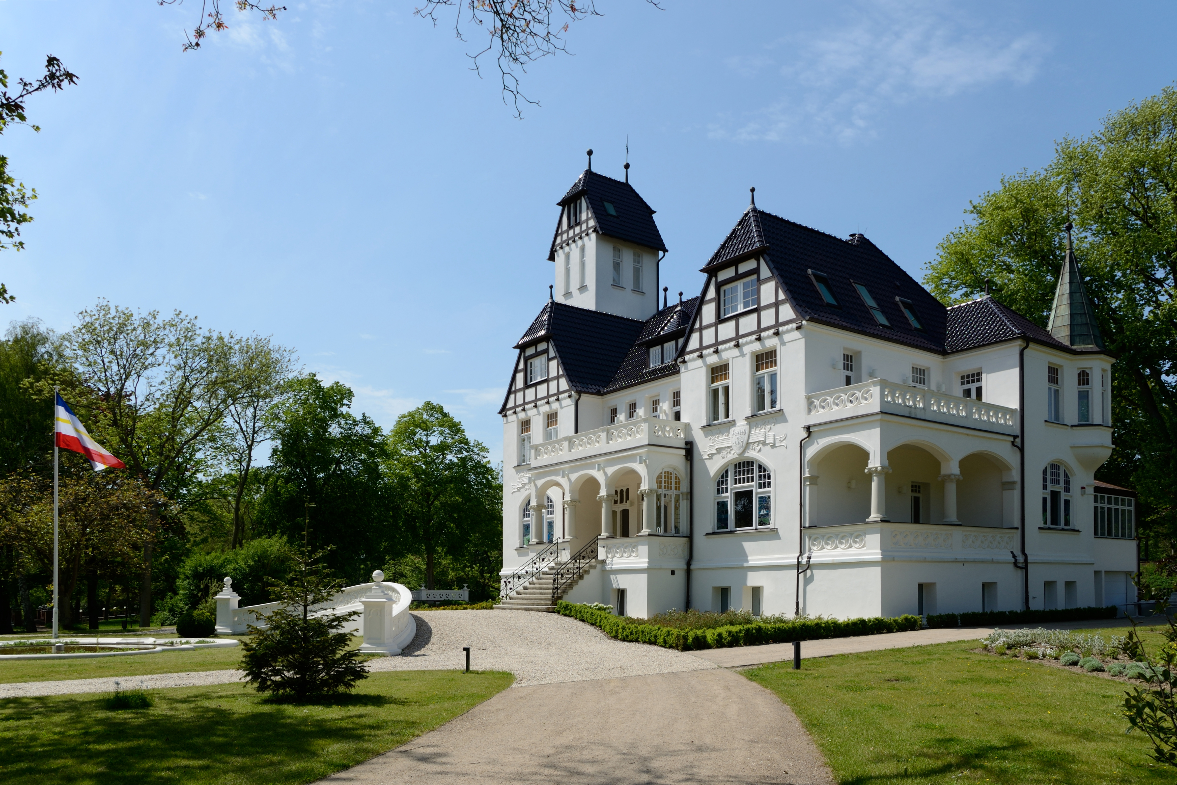 1907 erbautes Wohnhaus des Papendorfer Unternehmers Heinrich Höppner - Eigenbezeichnung auf der Homepage lautet Villa Papendorf